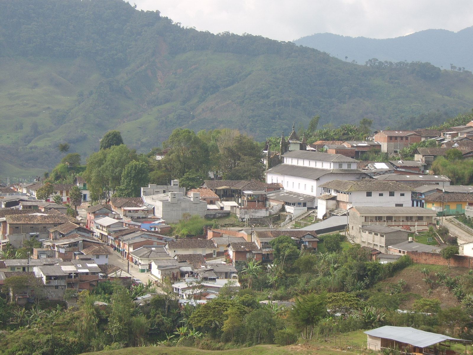 vista del Municipio de Argelia. Antioquia, Colombia.